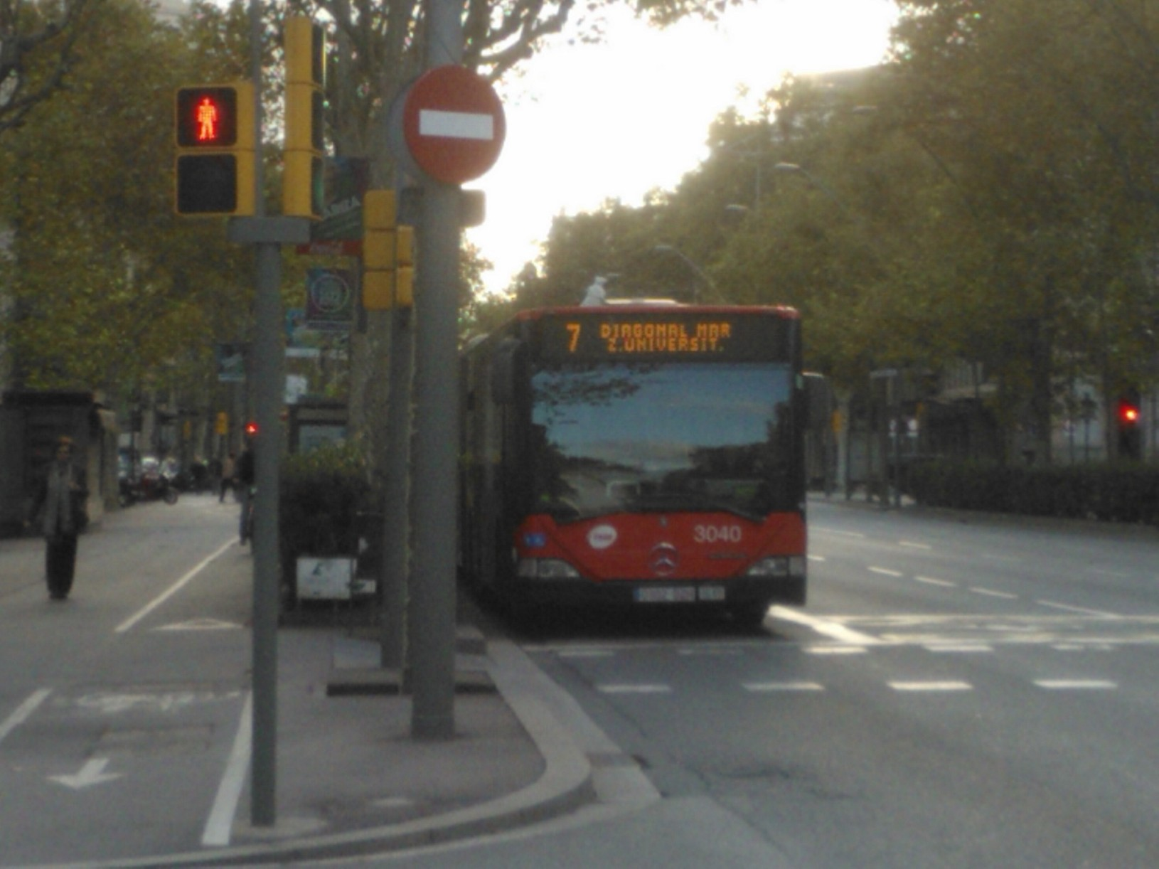 Autobús urbà de Barcelona